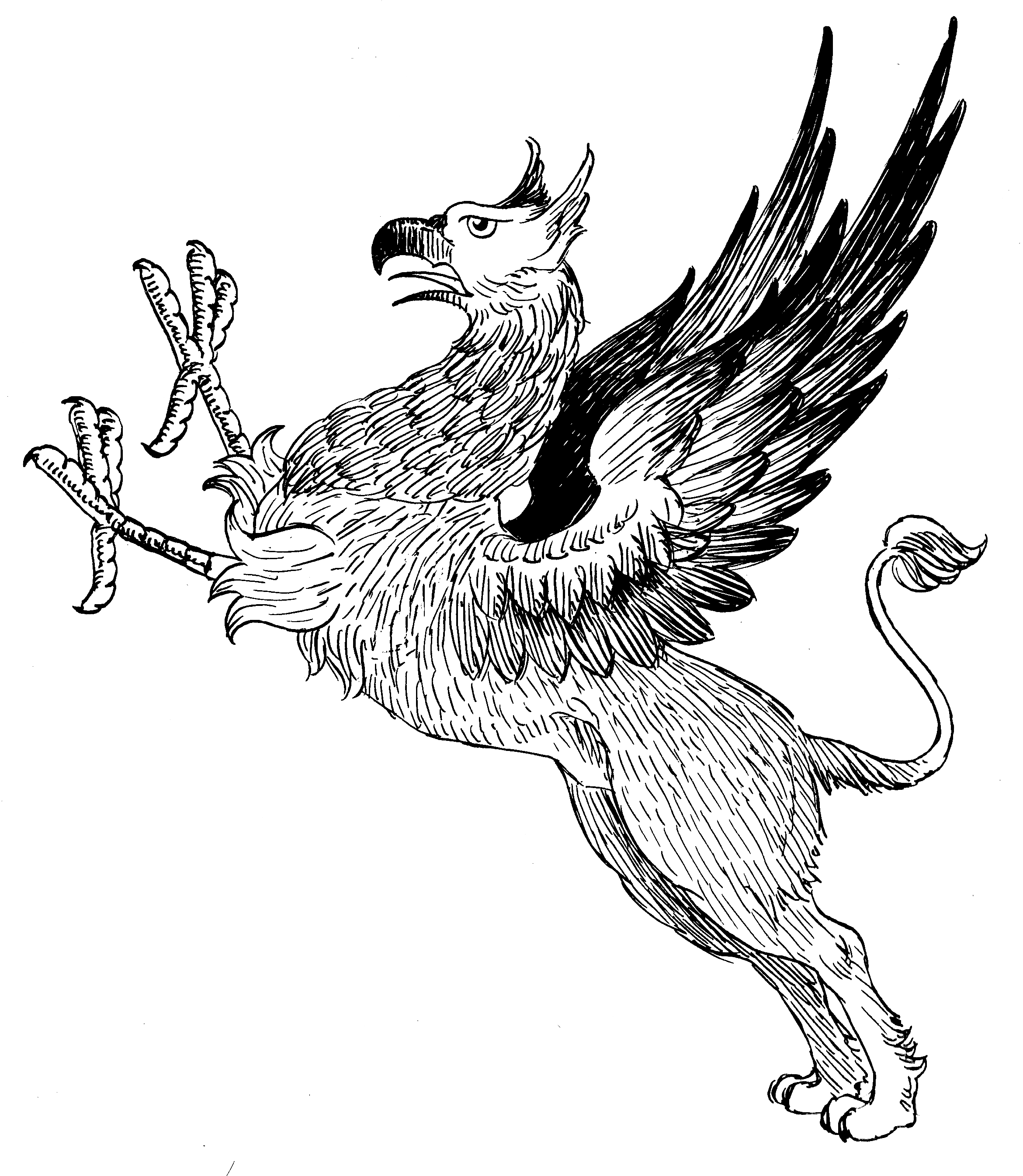 Griffin